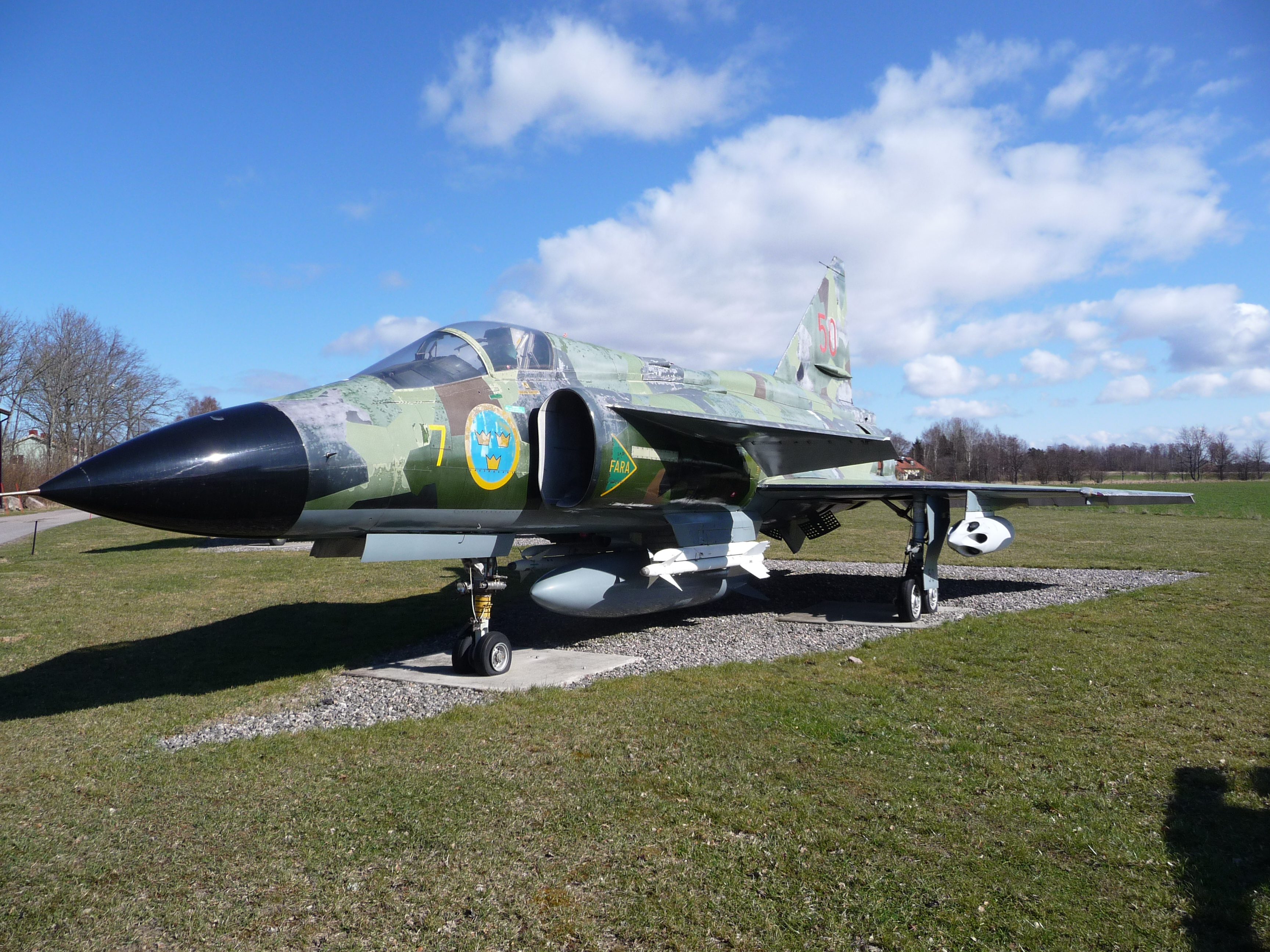 Individen levererades till Flygvapnet den 23 mars 1974, och har tjänstgjort som 7-50, 15-09, vid flottiljerna F 7 och F 15. Den 13 mars 1996 gjordes den sista flygningen F 14 i Halmstad till F 7. Individen modifierades aldrig till AJS 37, utan den plundrades på reservdelar, och kasserades den 12 februari 1997. Individen placerades först vid flottiljens brandstation och sedan utanför flottiljvakten, där den stod tillsammans med J 32D Lansen (32603) och JAS 39A Gripen (39113). Den 16 juli 2014 togs den bort, och står magasinerad inne på flottiljen. Dess framtid är osäker, på grund av flygplanskroppen är i ytterst dålig kondition.